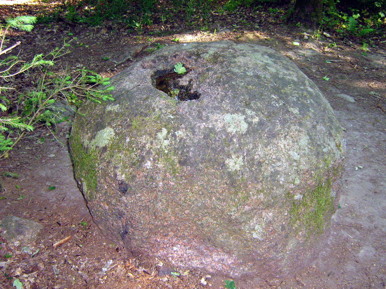 Lopaičiai, Akmuo su ženklu šventvietėje Foto: Algirdas, 2007-06-12